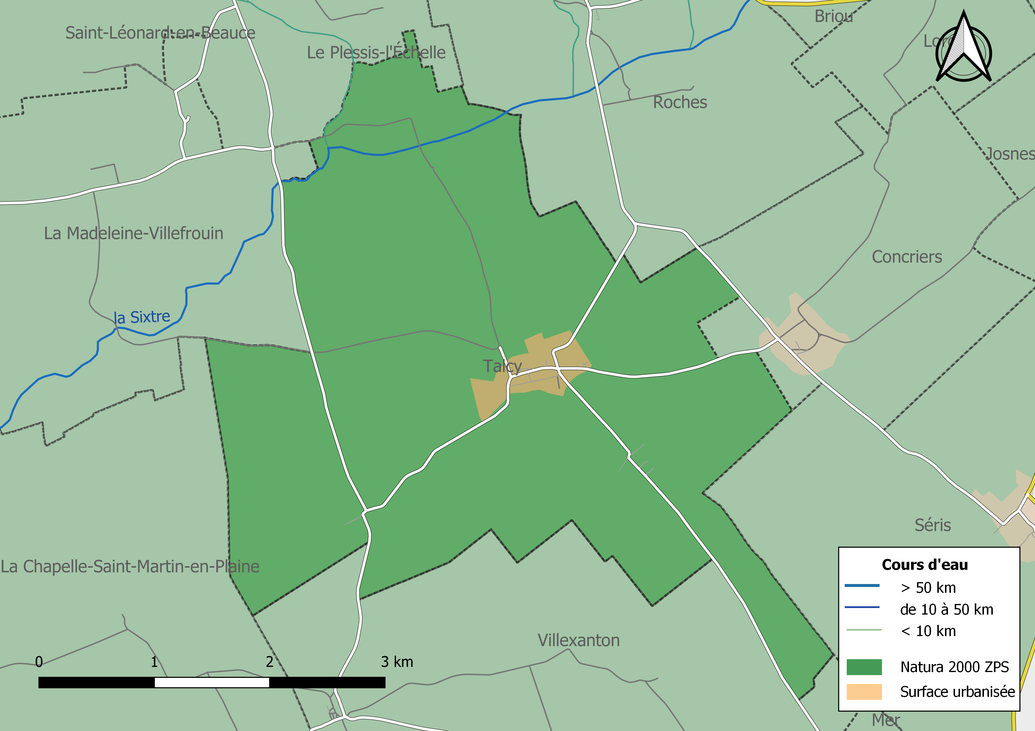 Carte du site Natura 2000 de type ZPS de la commune de Talcy (France).